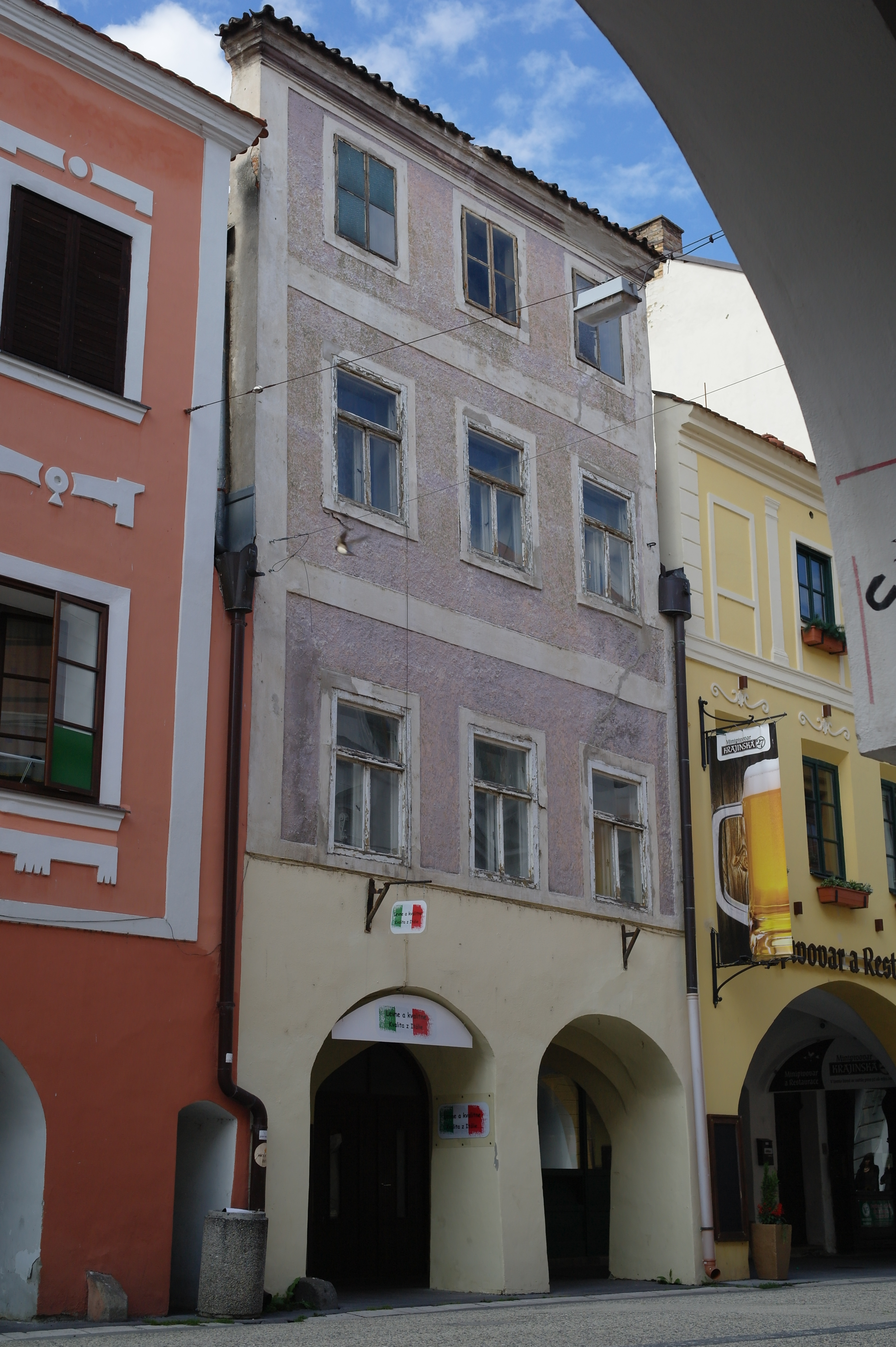 Dům čp. 234 v centru Českých Budějovic